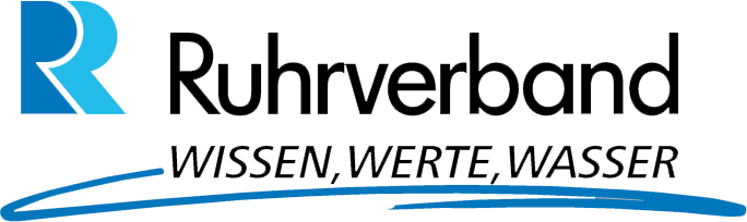 Logo des Ruhrverbands